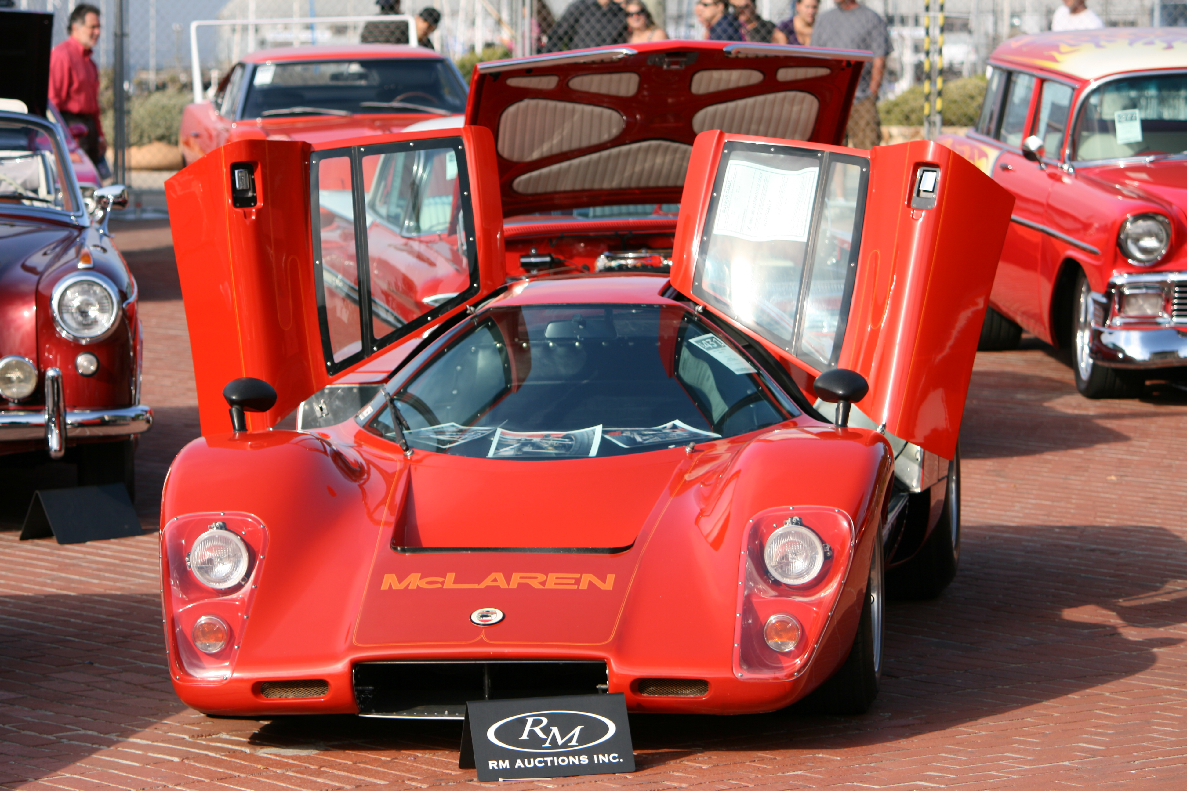 McLaren M6GT Sold for $137,500